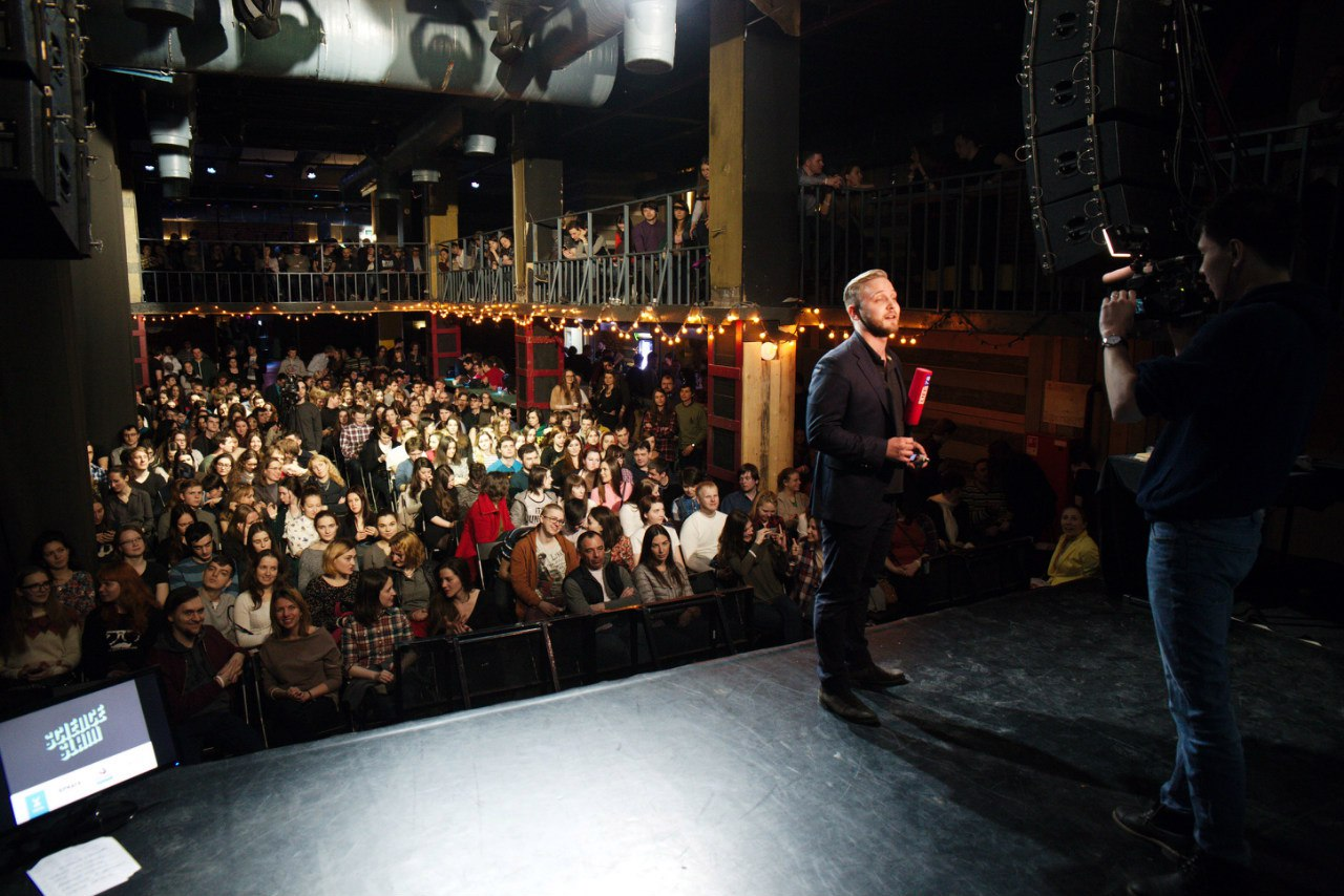 Science Slam двух столиц, Петербург, клуб А2.